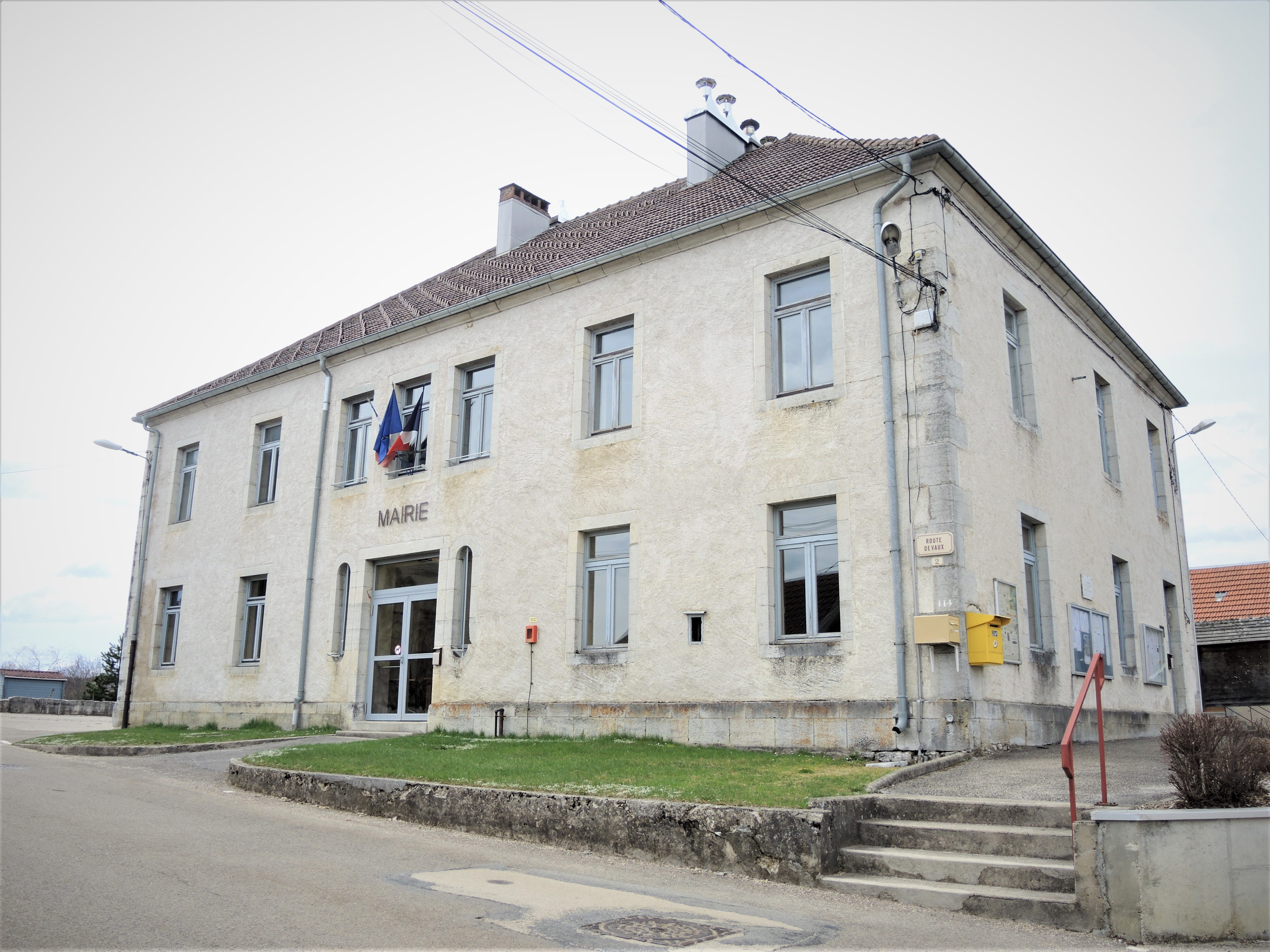 Mairie de La Planée. Doubs